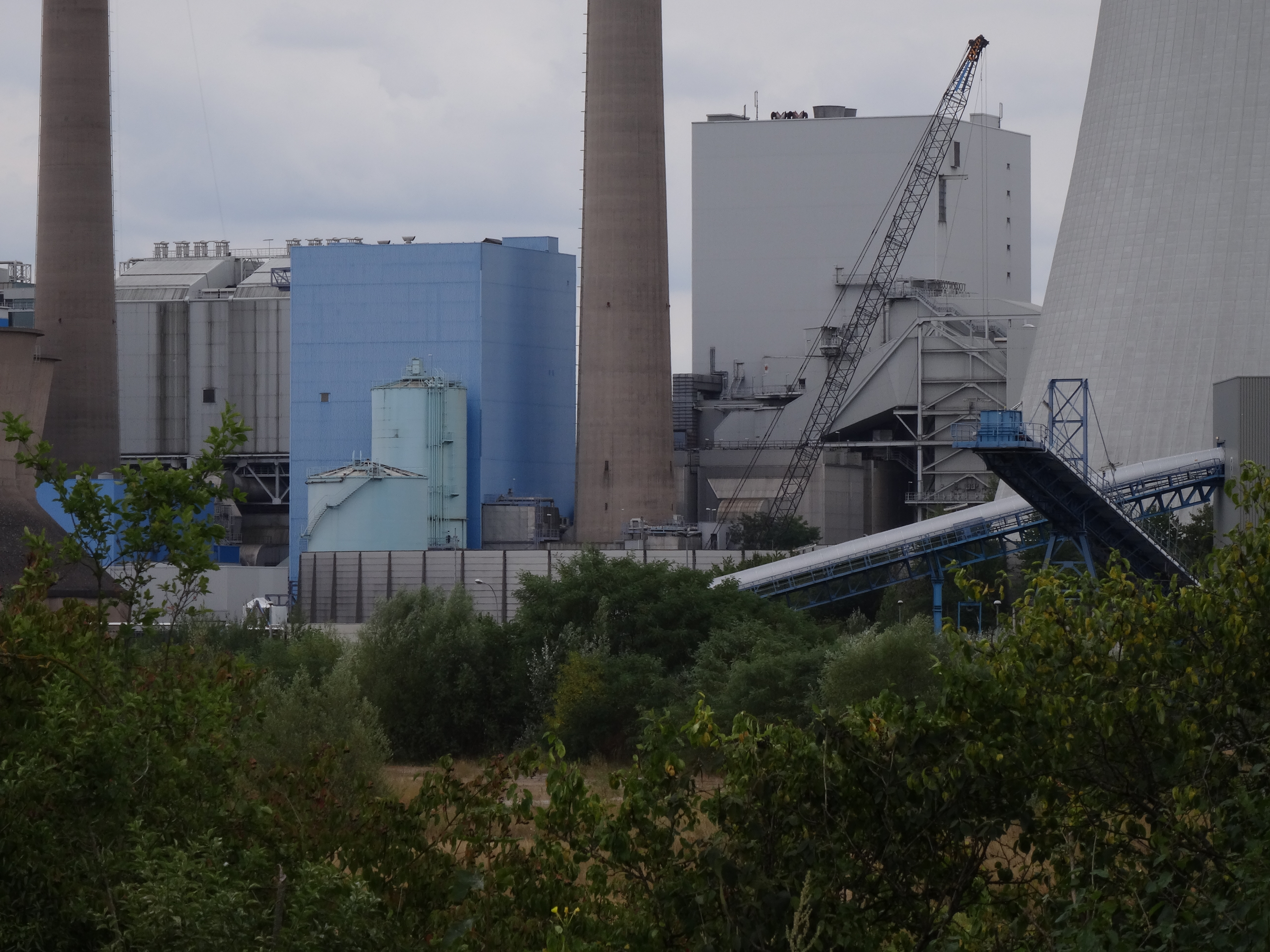 Eine Woche nach dem Abriss des Kühlturms von Block 3 des Kraftwerk Staudingers ist nur noch die Rundumfassung zu sehen. Der Abriss erfolgte mit einer Abrissbirne.